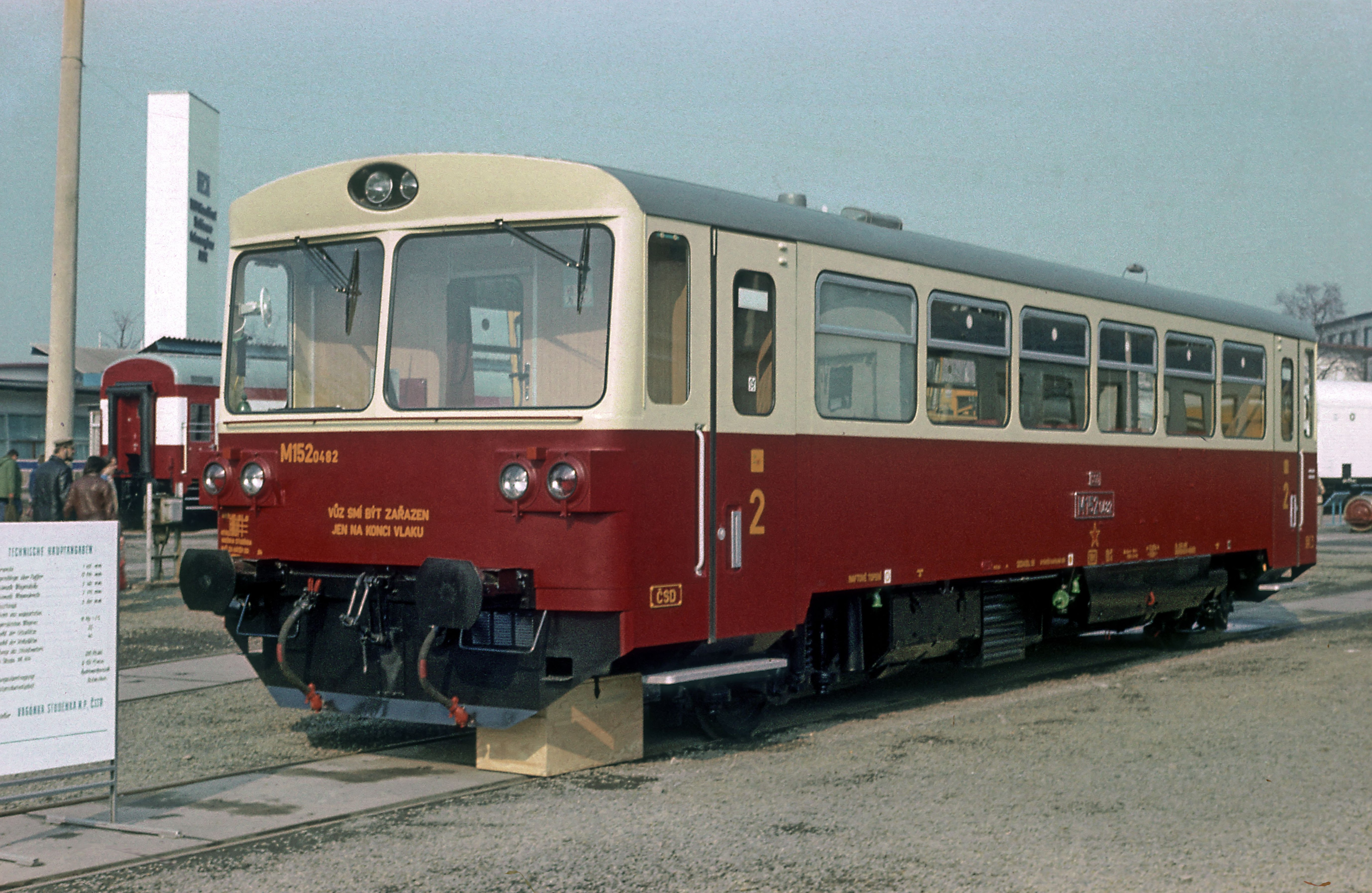 ČSD-Dieseltriebwagen M 152.0, Serienfahrzeug auf der Leipziger Frühjahrsmesse 1982